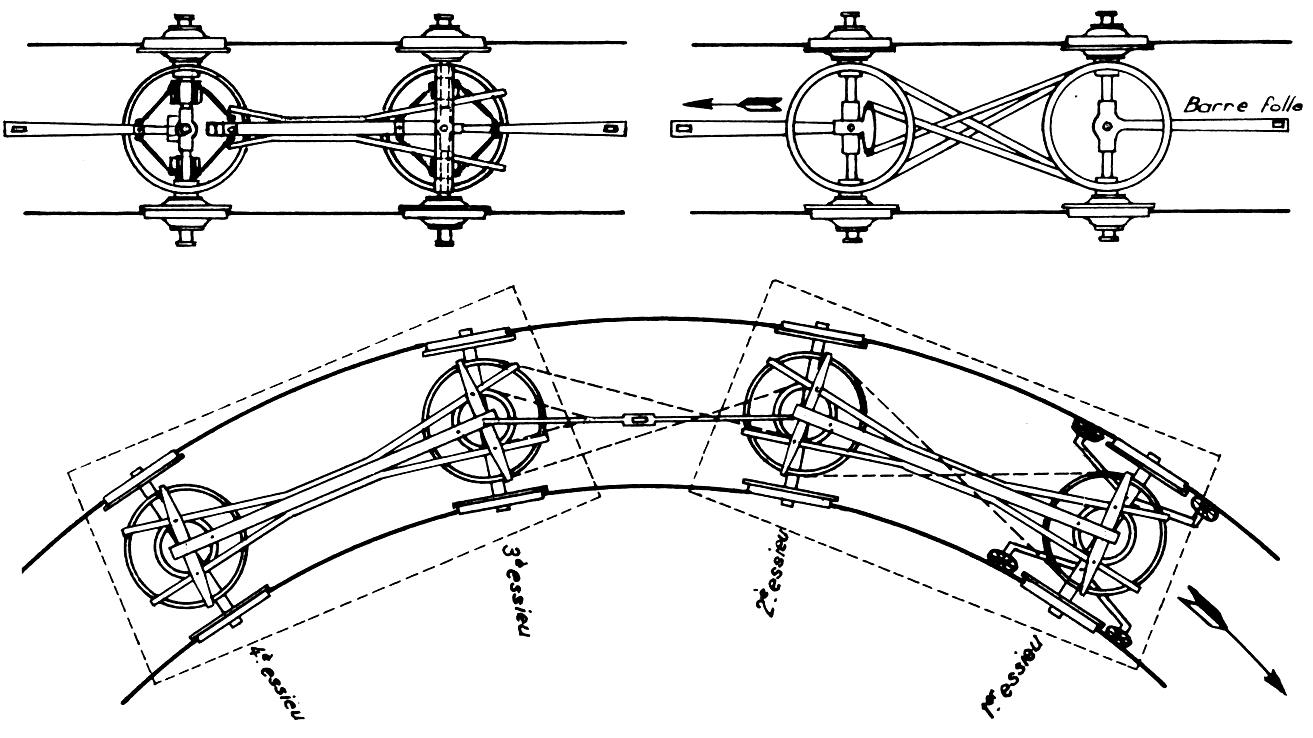 Schéma du système Arnoux prévoyant l’orientation des essieux de véhicules ferroviaires par l’orientation des barres d’attelages. Licensing Catégorie:Image en rapport avec le chemin de fer